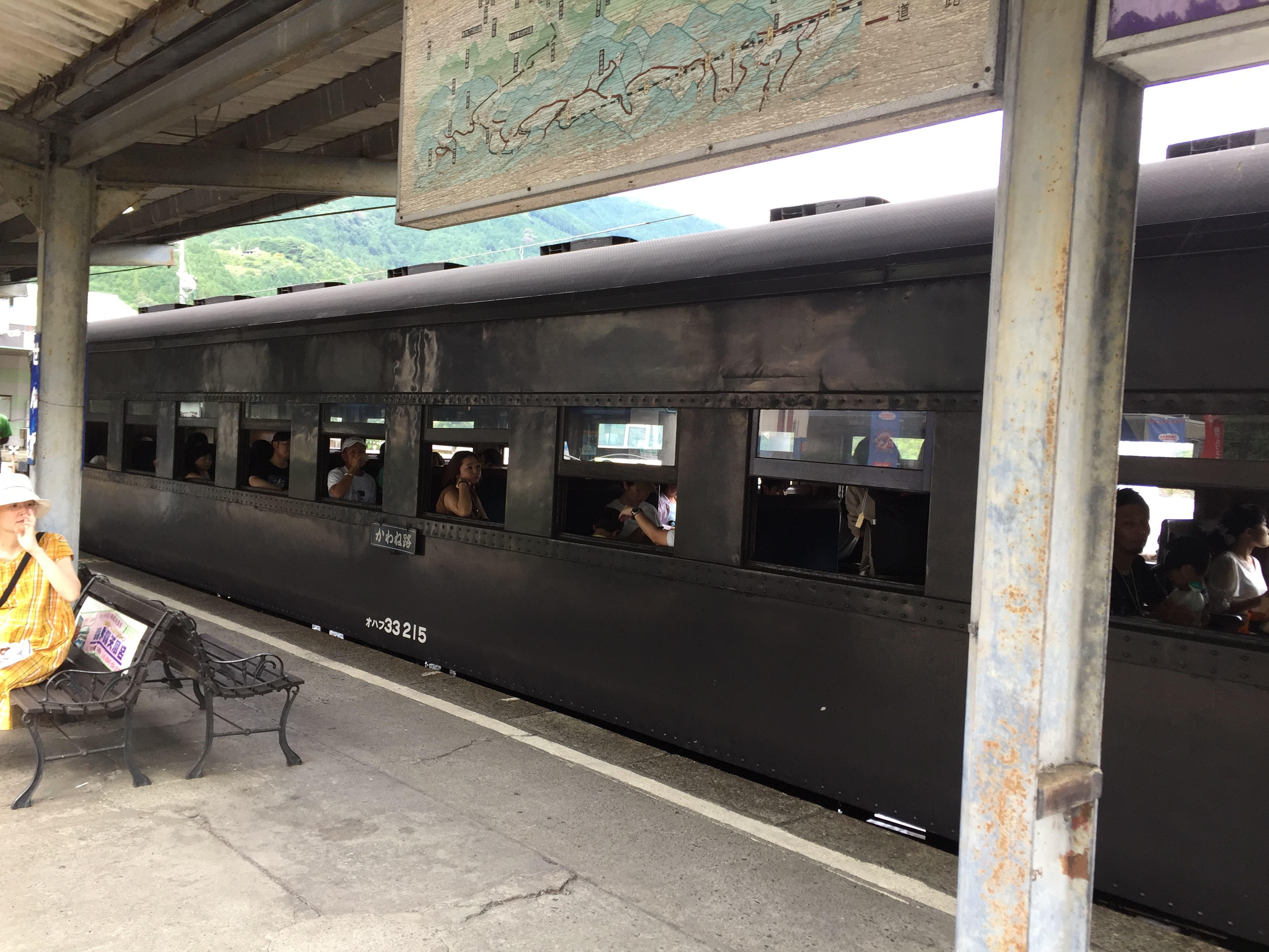 大井川鐡道で稼働中のオハフ33 215